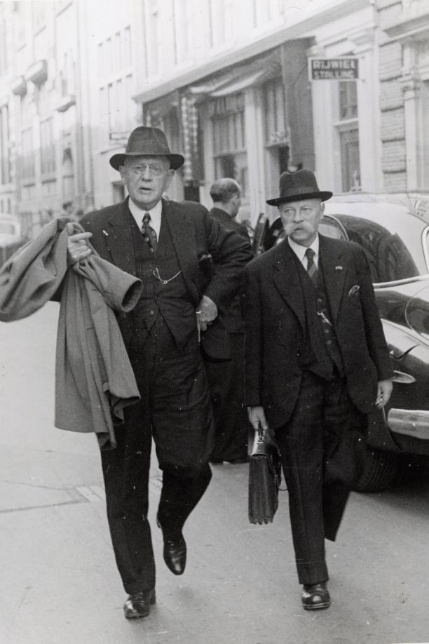 De heren P.S. Gerbrandij (rechts) (ARP) en Ch.J.J.M. Welter bij aankomst bij het Bijzonder Gerechtshof in Amsterdam. Nederland, 9 mei 1947.